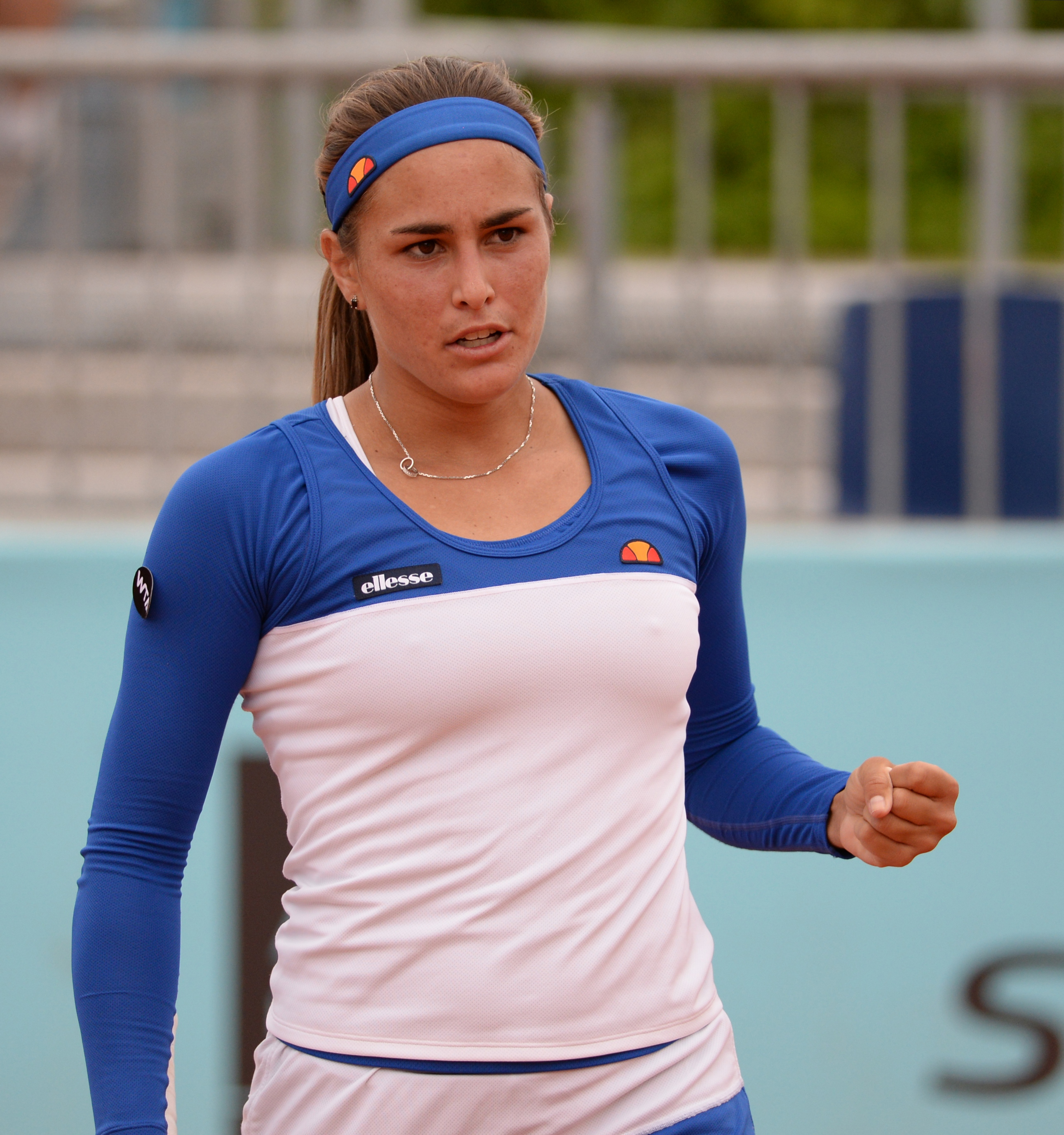 Monica Puig